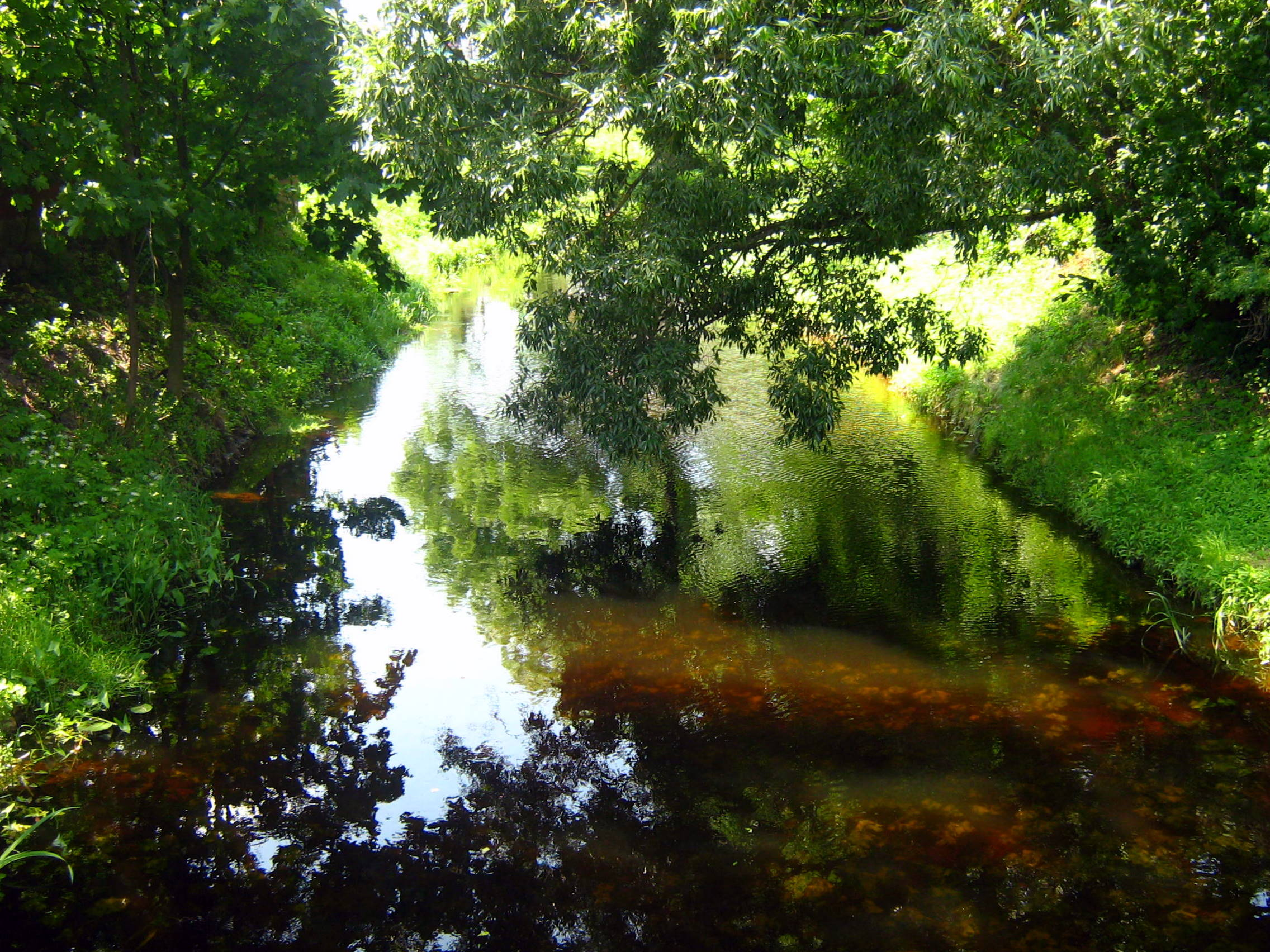 Marycha w Sejnach.